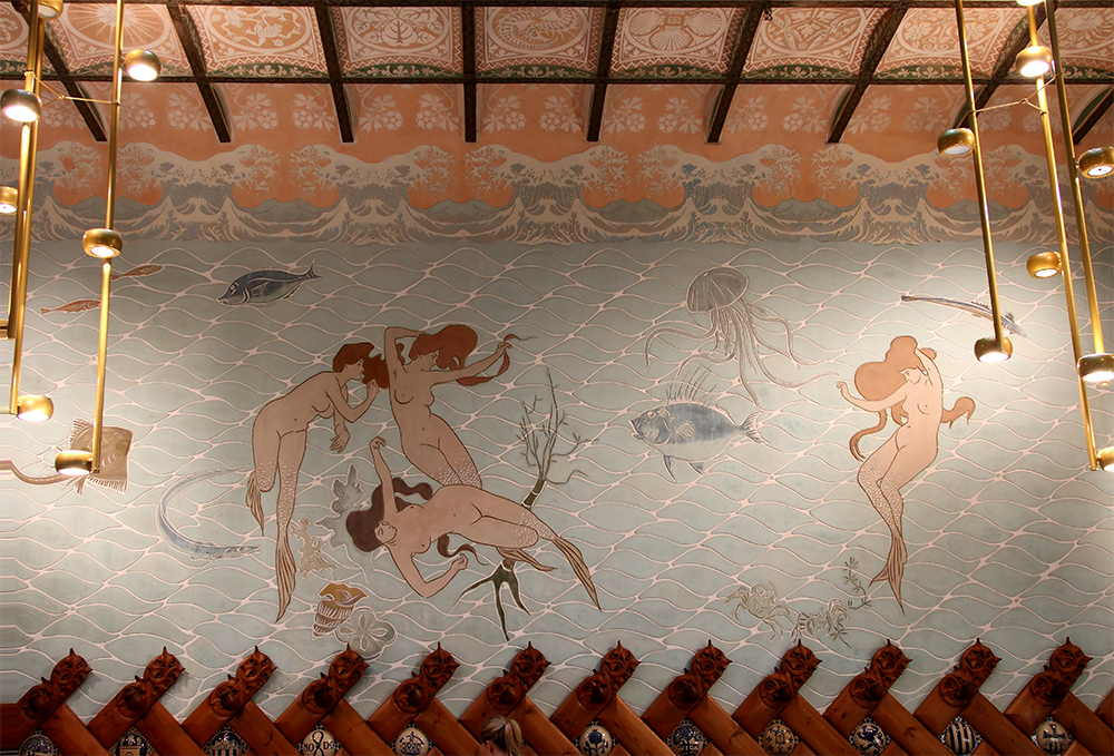 Mural esgrafiat del saló menjador de l'Hotel Espanya (Barcelona) obra de Ramon Casas, realitzat dins les reformes modernistes que va dirigir Lluís Domènech i Montaner el 1903.